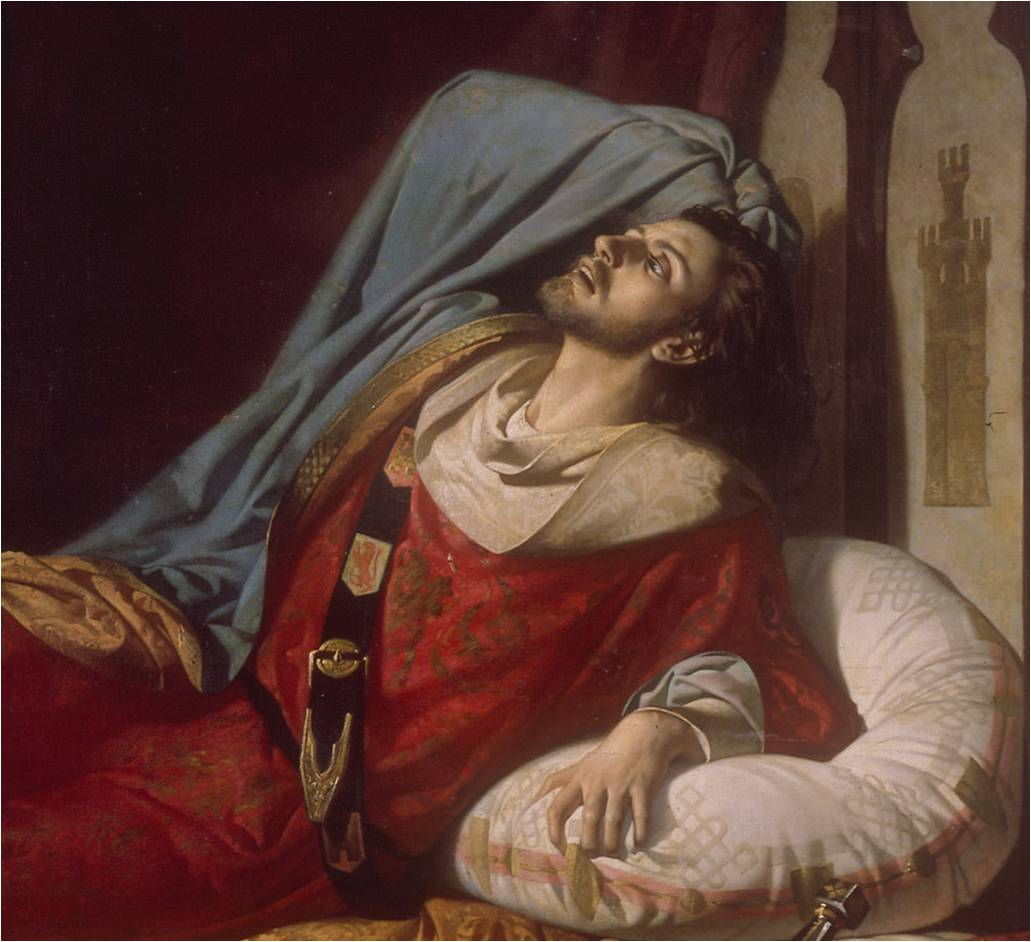 El rey Fernando IV de Castilla (1285-1312). Detalle del cuadro titulado los Últimos momentos de Fernando IV el Emplazado.